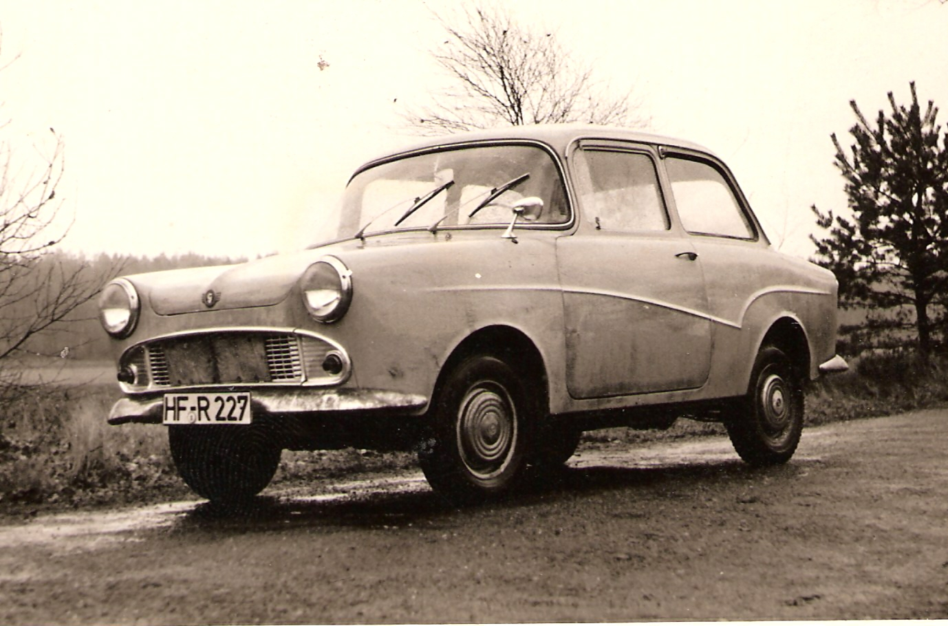 Glas 700 (Isar)